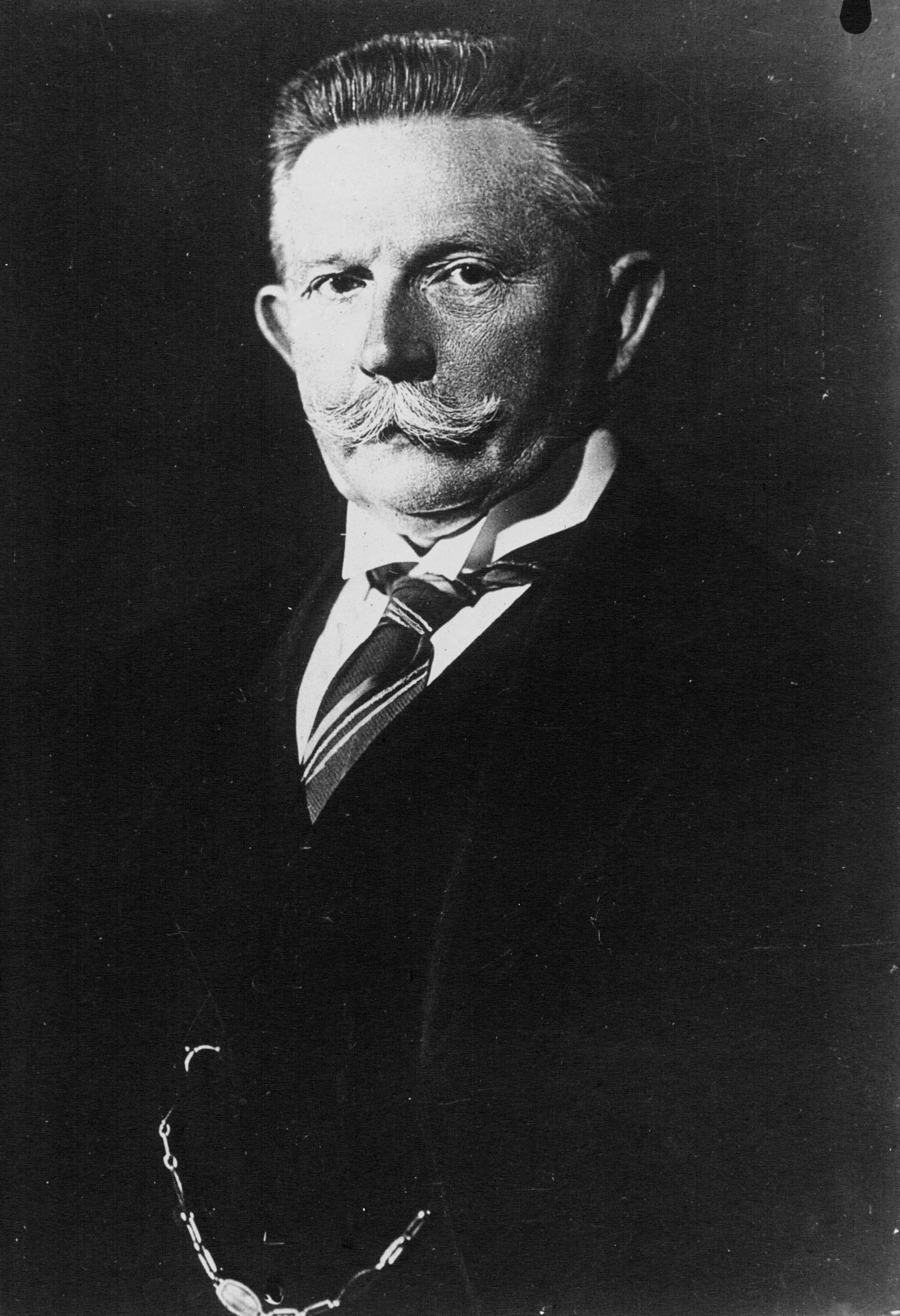 Alfred Hugenberg, ministro de Instrucción Pública del gabinete de Hitler, en 1933.